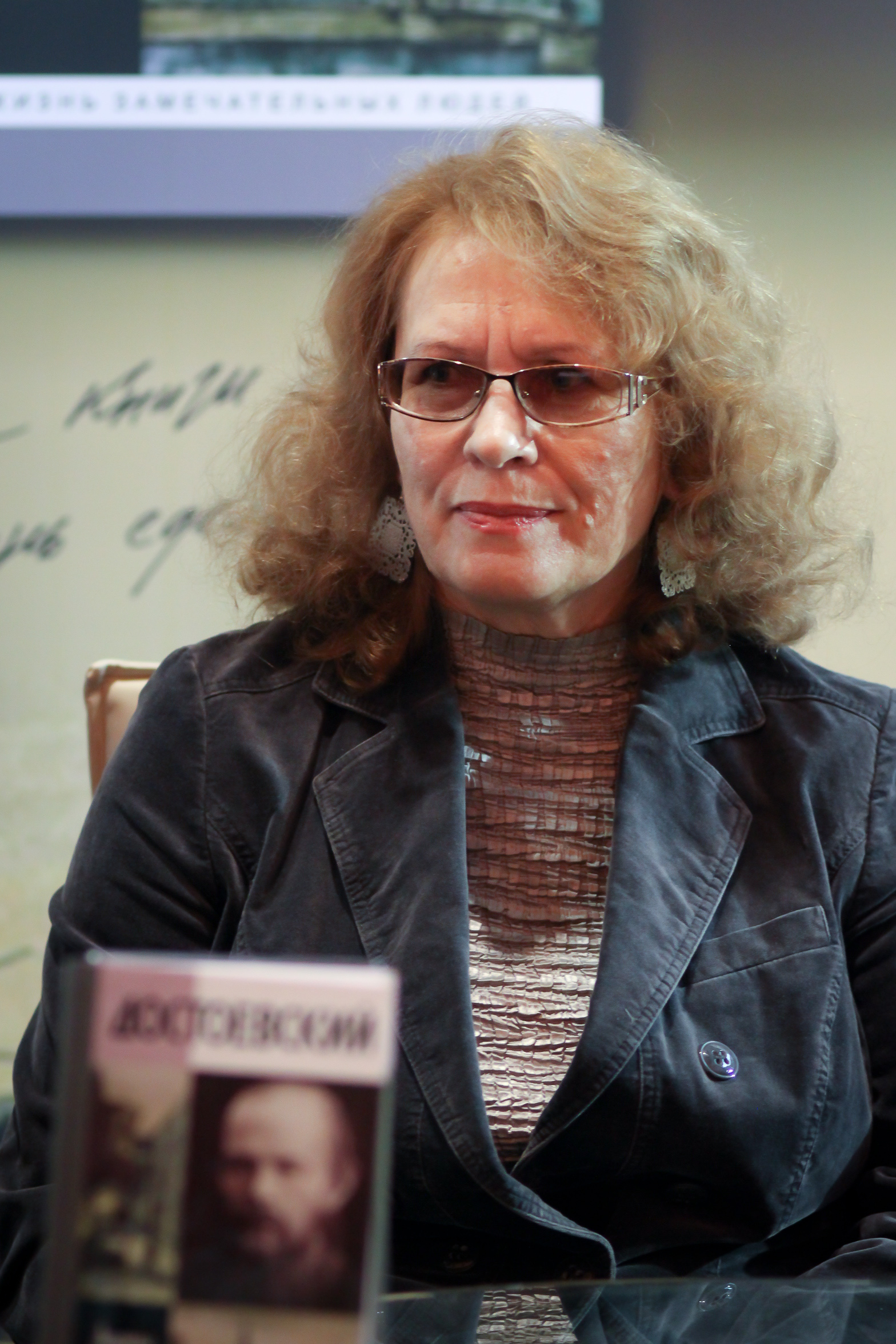 Людмила Сараскина на ММКВЯ-2011